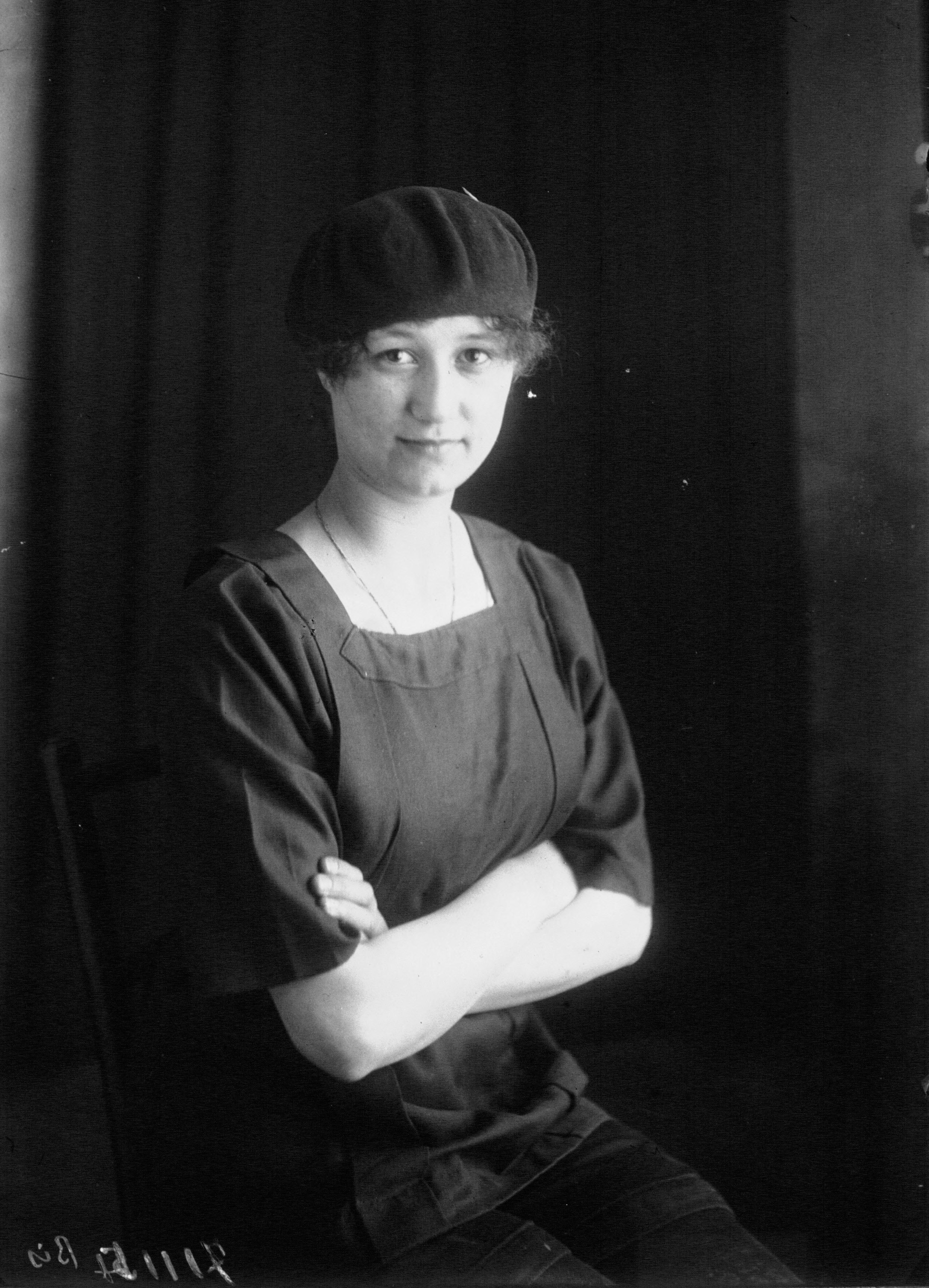 Mlle Thérèse Brulé, championne de Femina Sport.